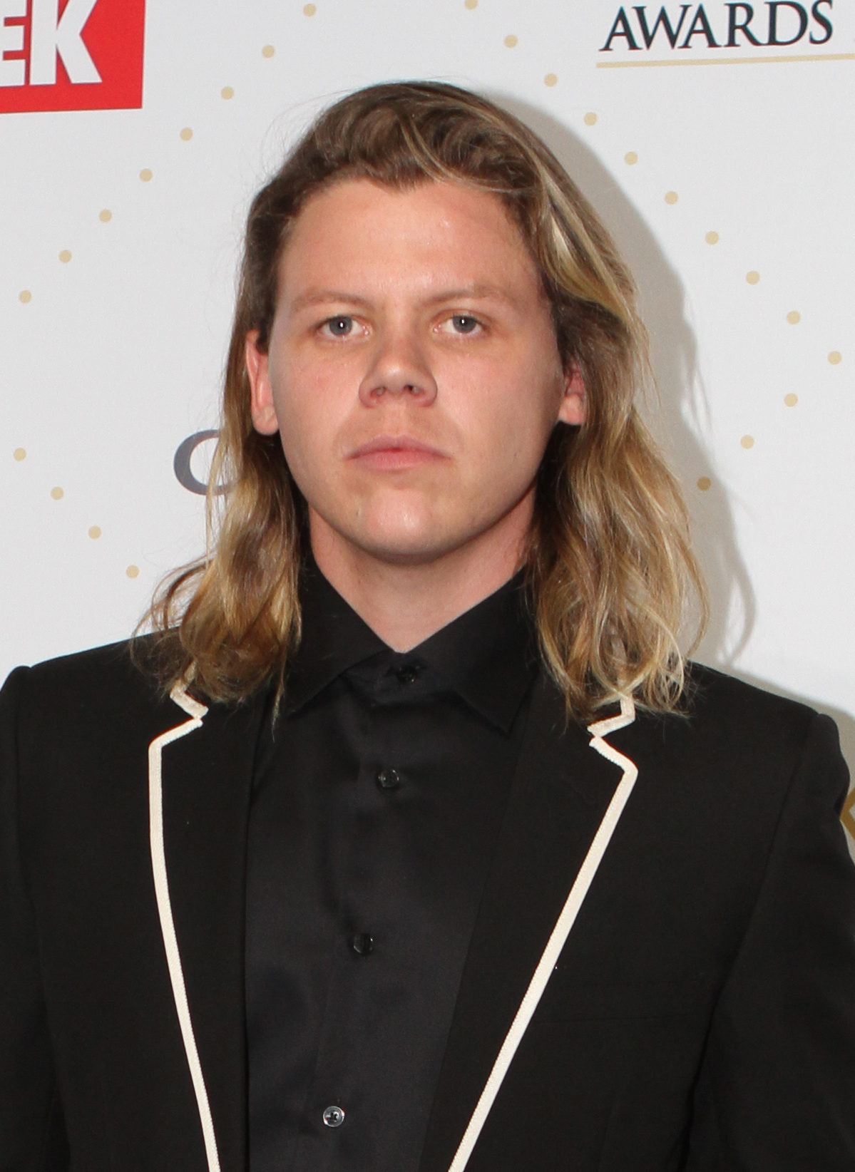 Conrad Sewell, 2016 TV Week Logie Awards